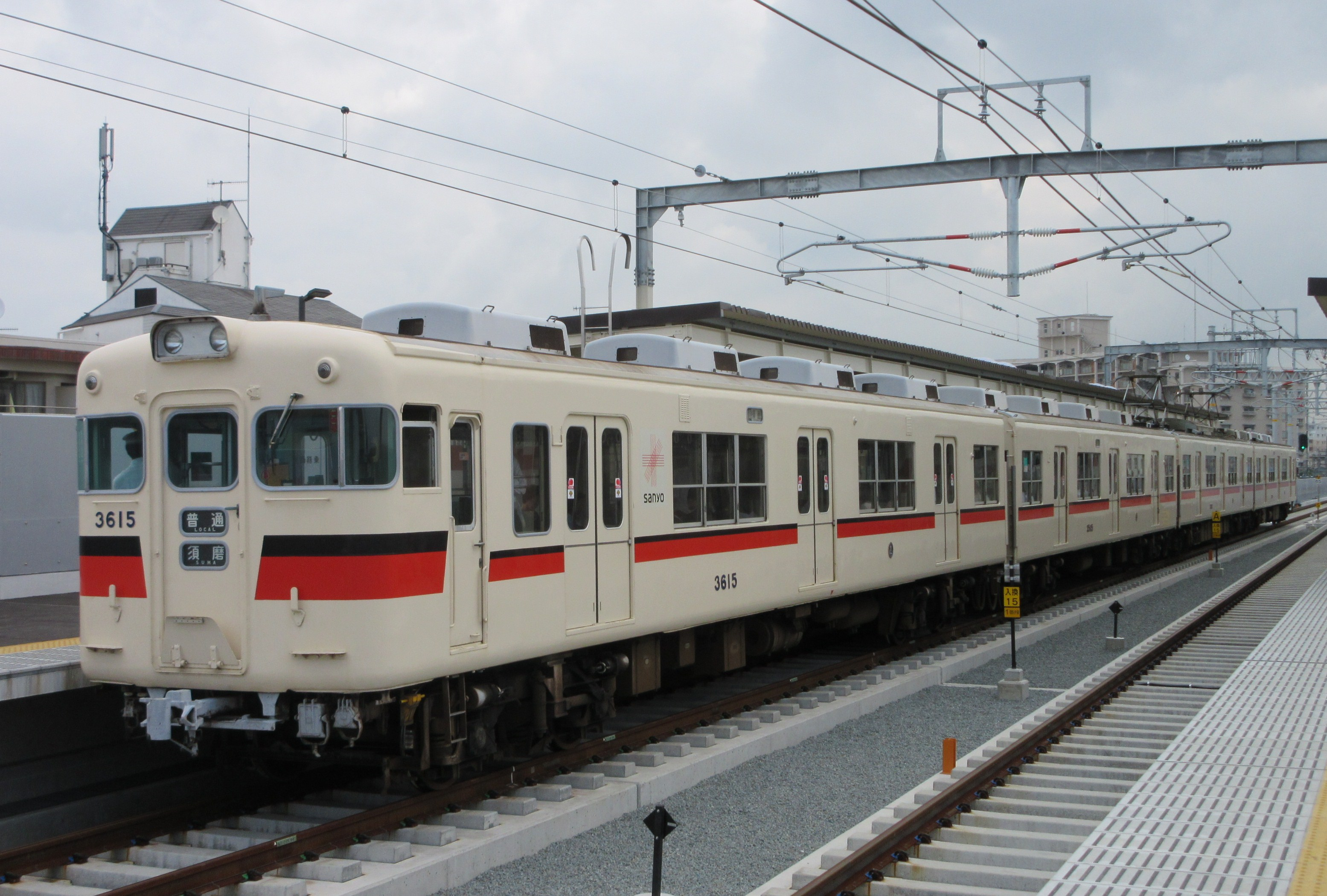 山陽電鉄3000系 3030編成(西新町駅にて)